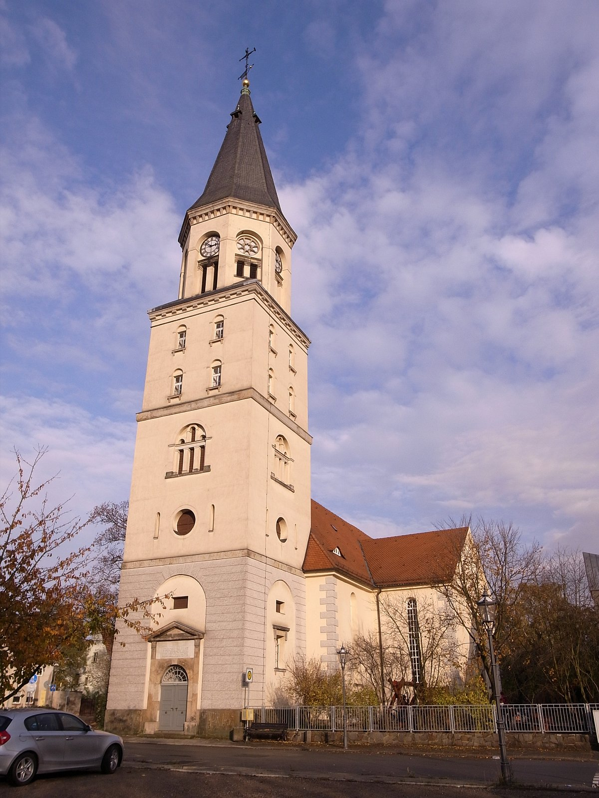 Bad Düben,Stadtkirche